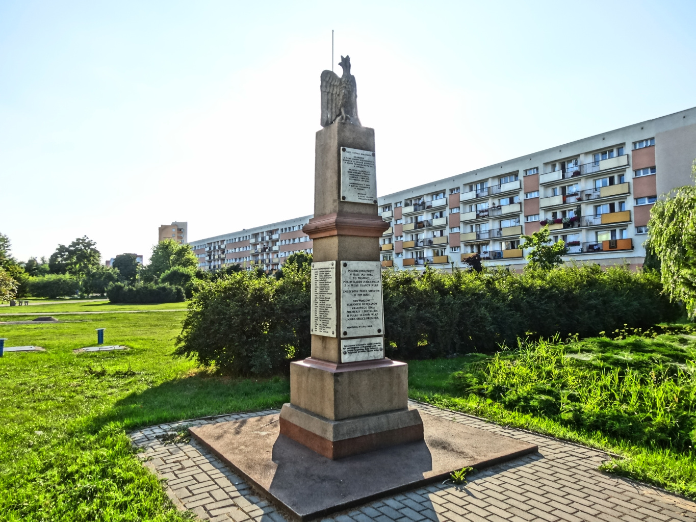 Pomnik pamięci żołnierzy 16 Pułku Ułanów Wielkopolskich w Bydgoszczy, którzy polegli w czasie II wojny światowej 1939-1945